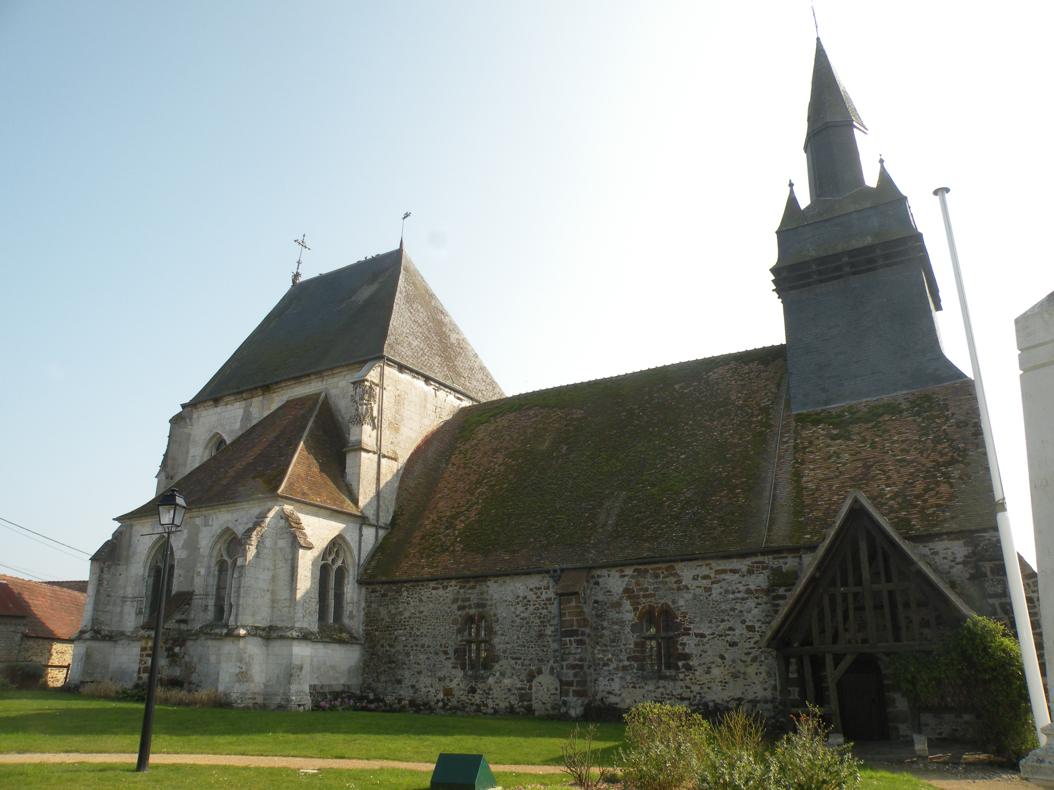 Église Saint-Denis d'Hodenc-en-Bray